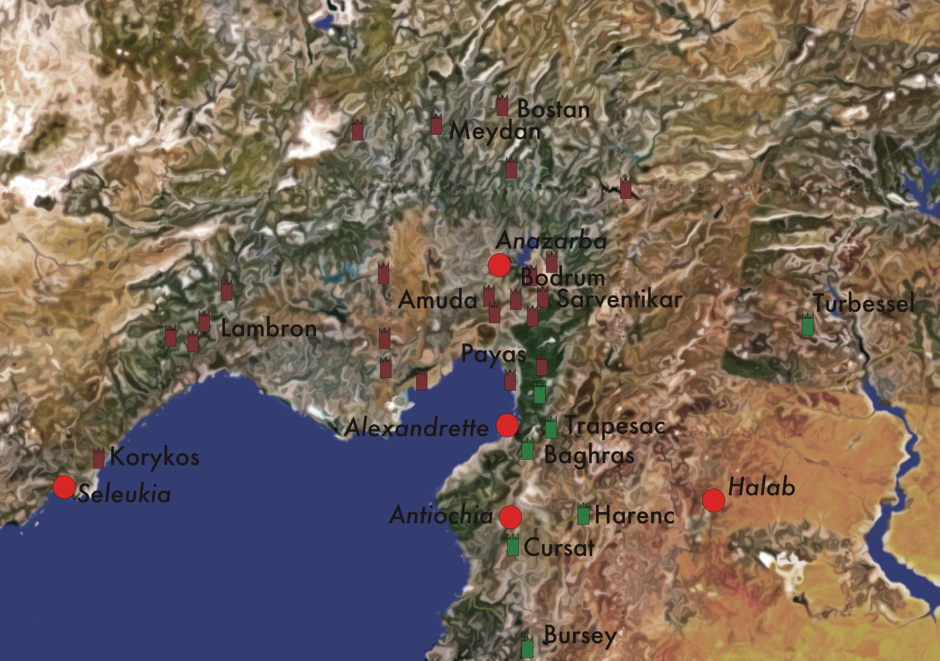 Armenische Burgen in Kilikien.